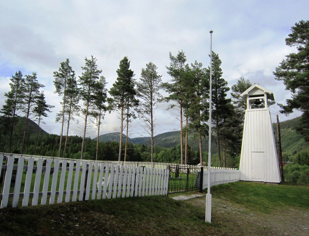 Finstad gravplass (Rendalen kommune, Hedmark)